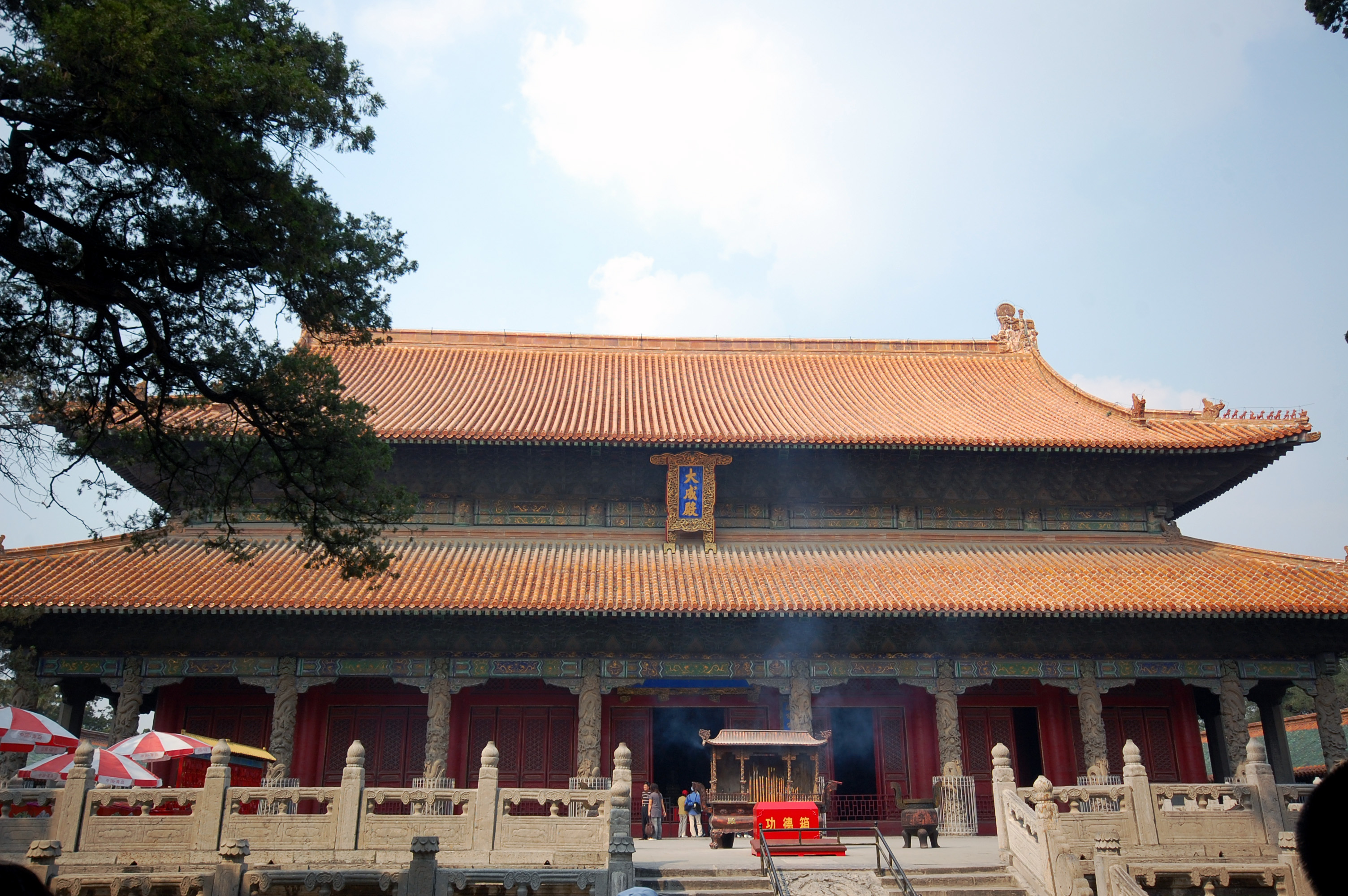 曲阜孔廟大成殿